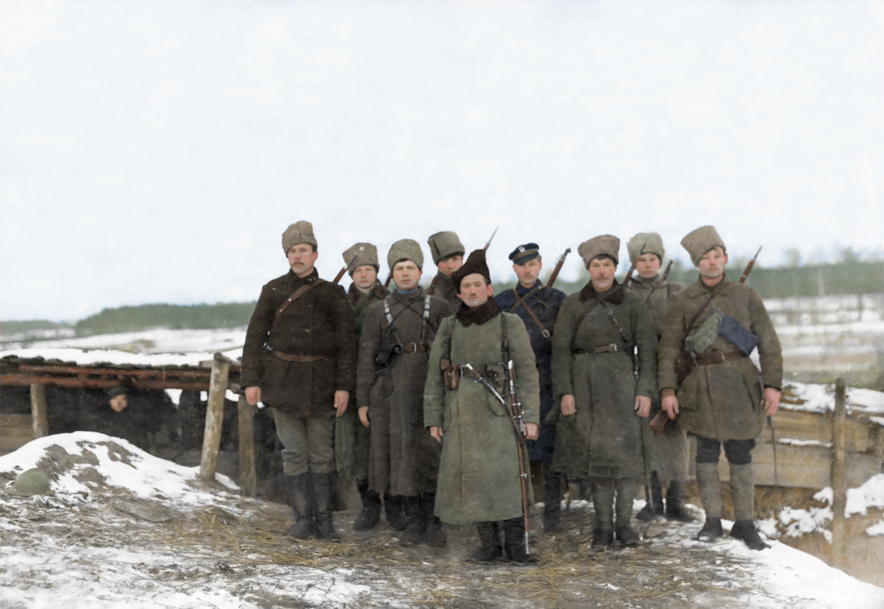 Касцяк Першага Беларускага партызанскага аддзела на чале з Лукашам Сяменікам (у цэнтры). Па правую руку ад яго – Юрка Моніч. За атаманам – Васіль Муха. Вёска Вялікае Стахава, 1919 г.